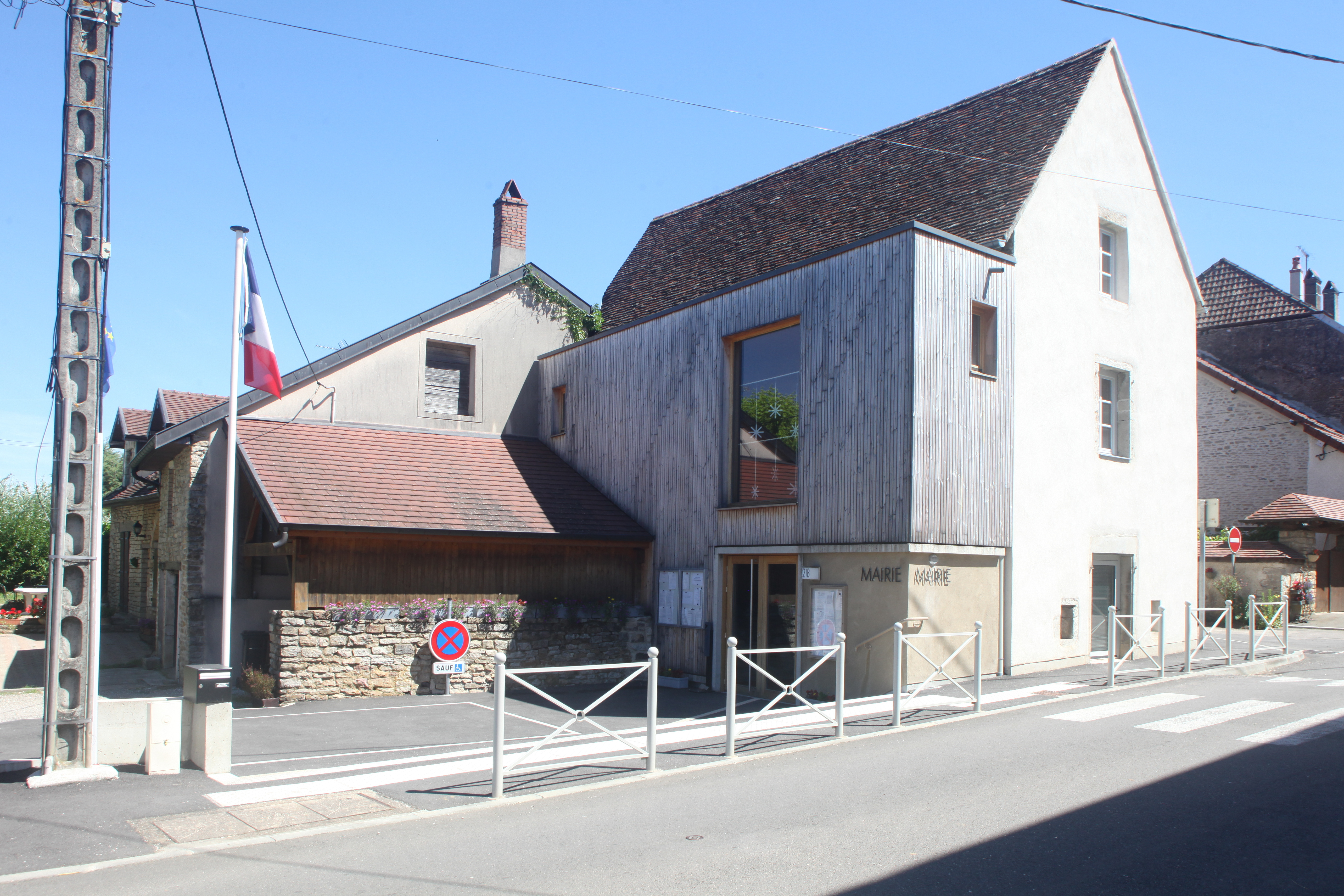 Mairie de Jallerange (Doubs).